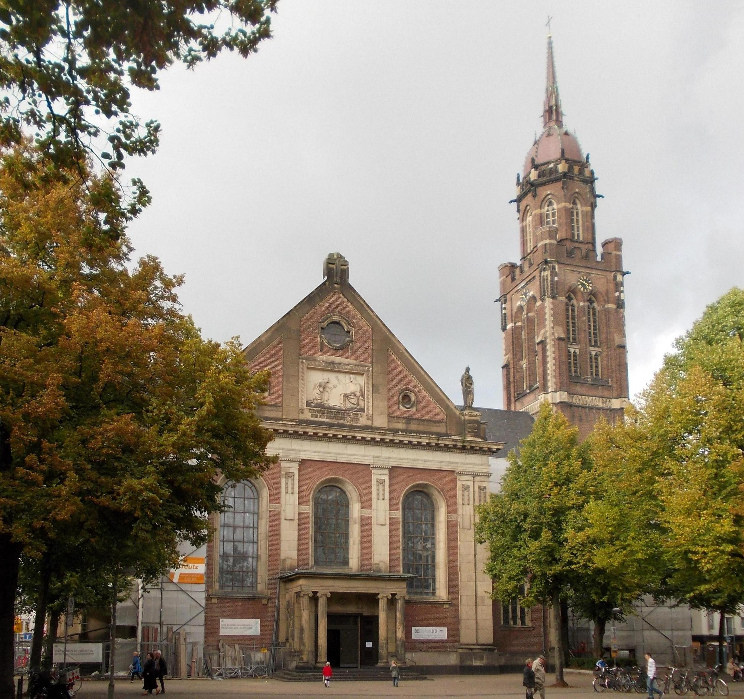 Krefeld: katholische Pfarrkirche St. Dionysius, Südseite, mit der 2010/2011 wiederhergestellten Turmspitze. This is the photograph of an architectural monument. It is part of the list of cultural monuments of Krefeld, no. 321